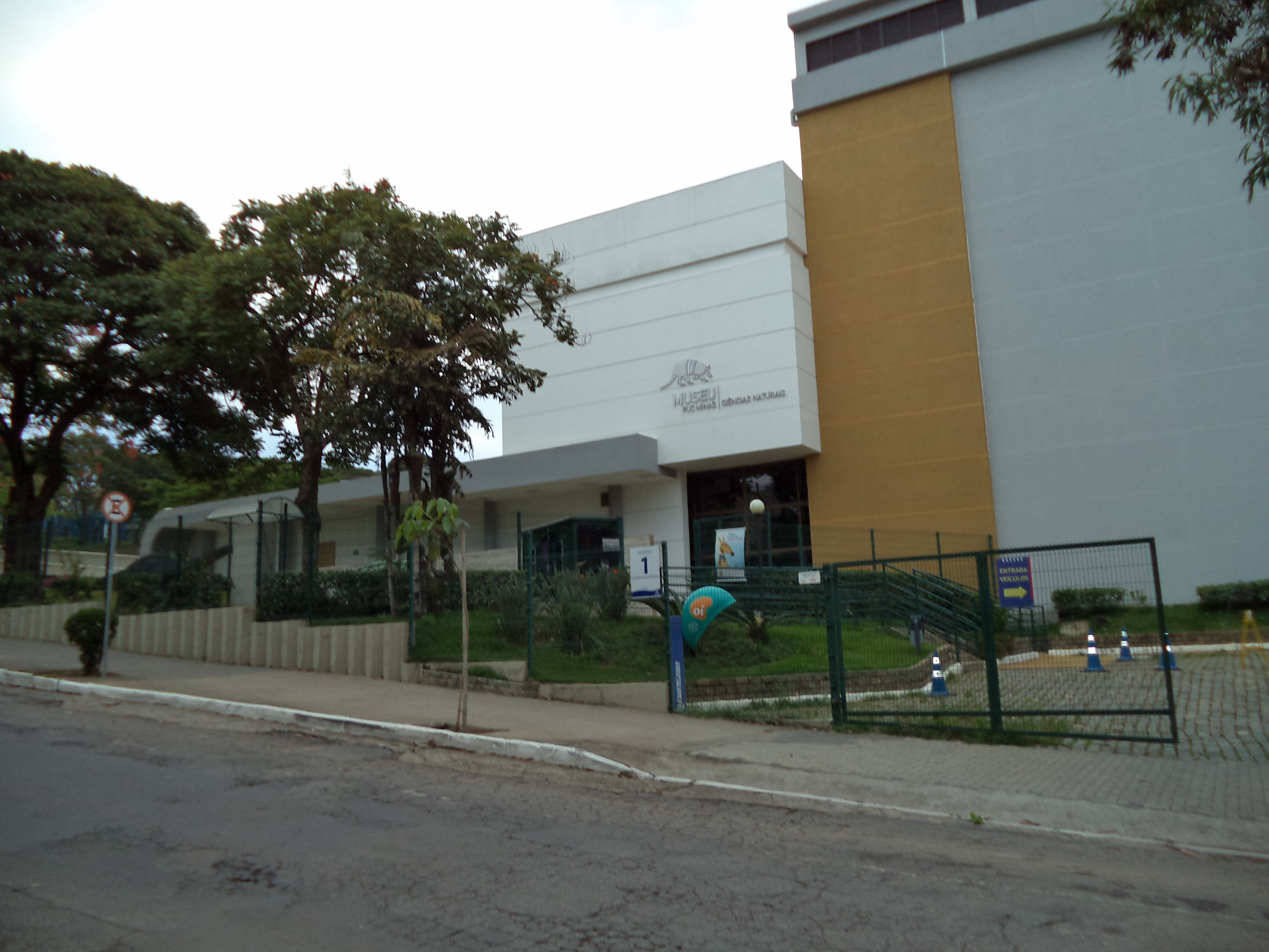 Museu na PUC Coração Eucarístico em Belo Horizonte.